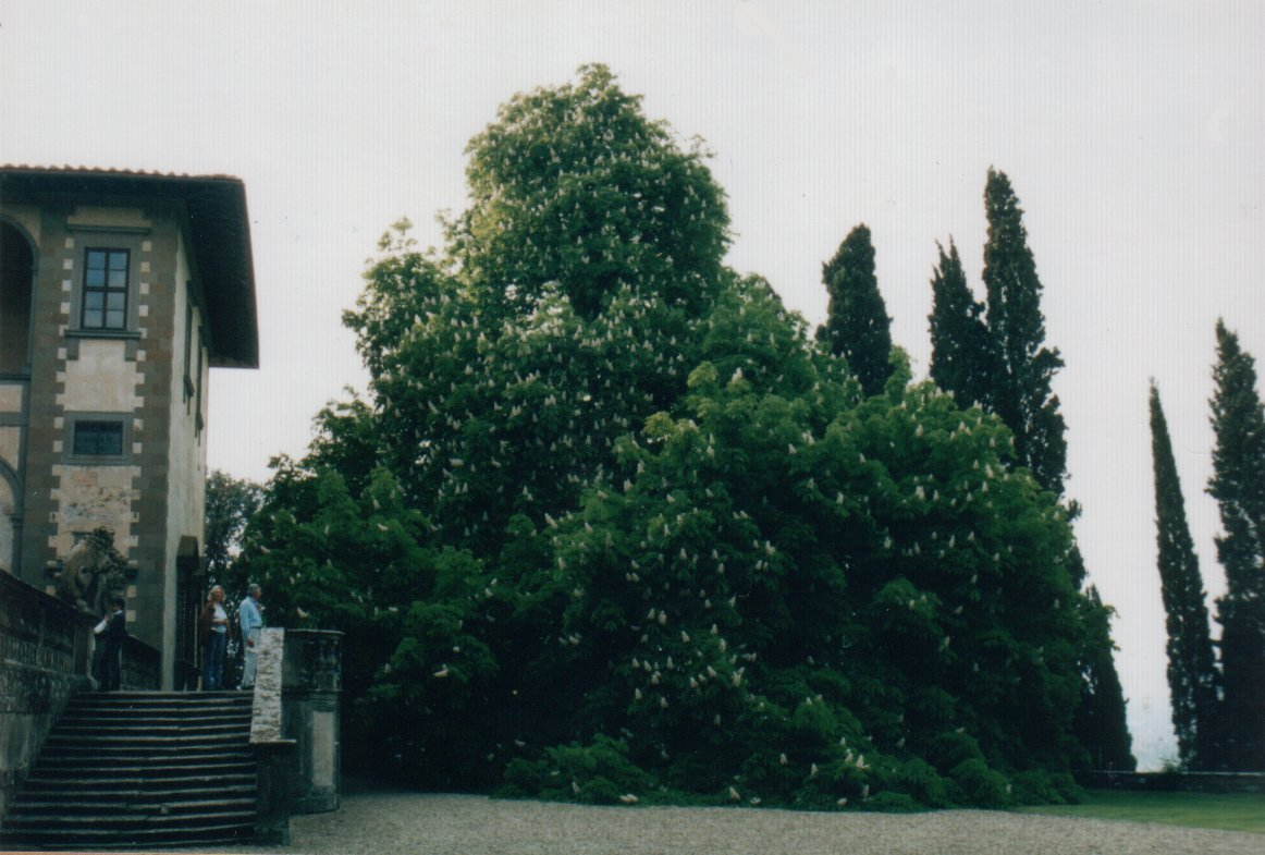 Ippocastano monumentale, giardino di Villa I Collazzi, provincia di Firenze